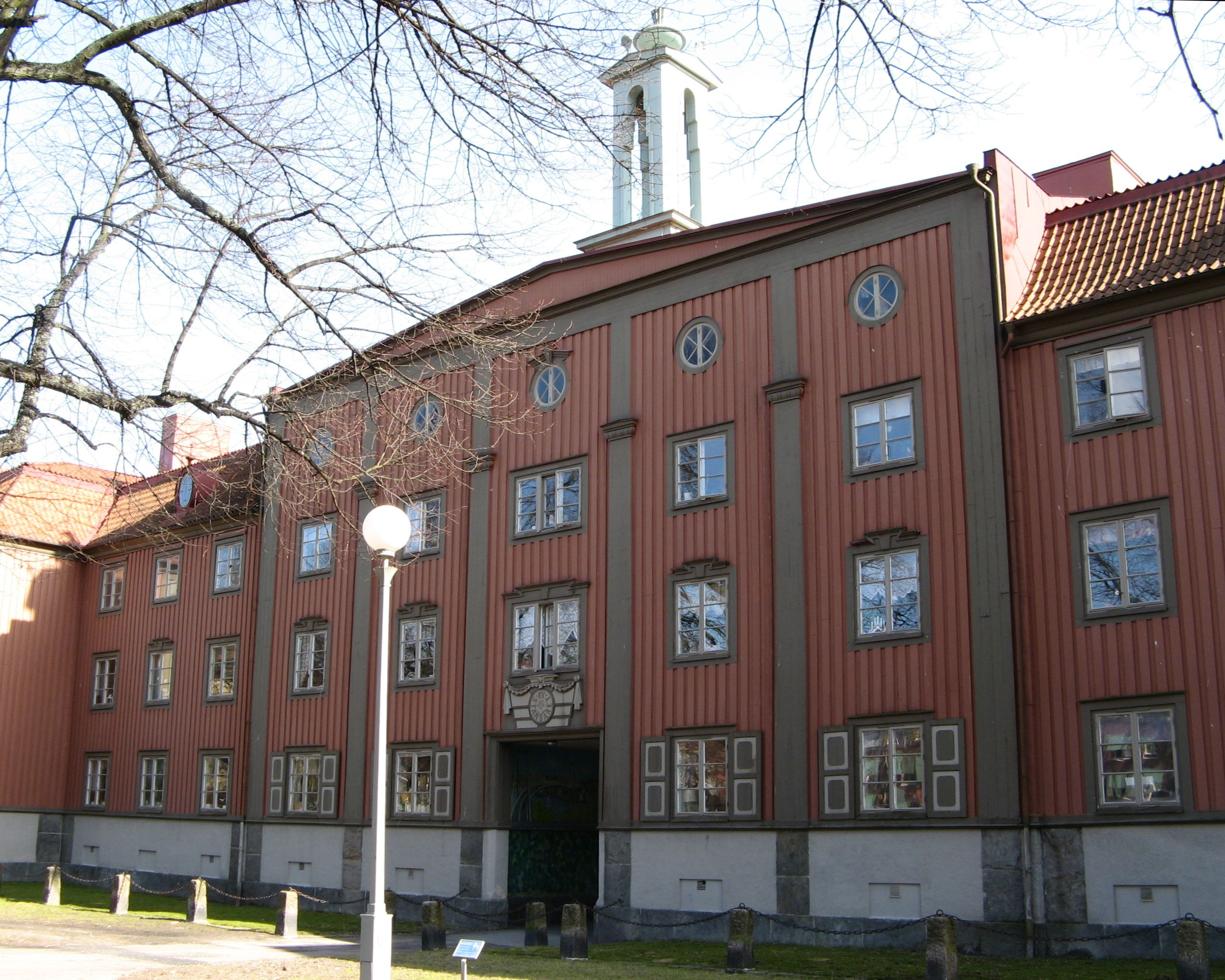 Photo: Thomas Höjemo Kvarteret Standaret, Karl Johans torg, Göteborg, built 1922-1923.